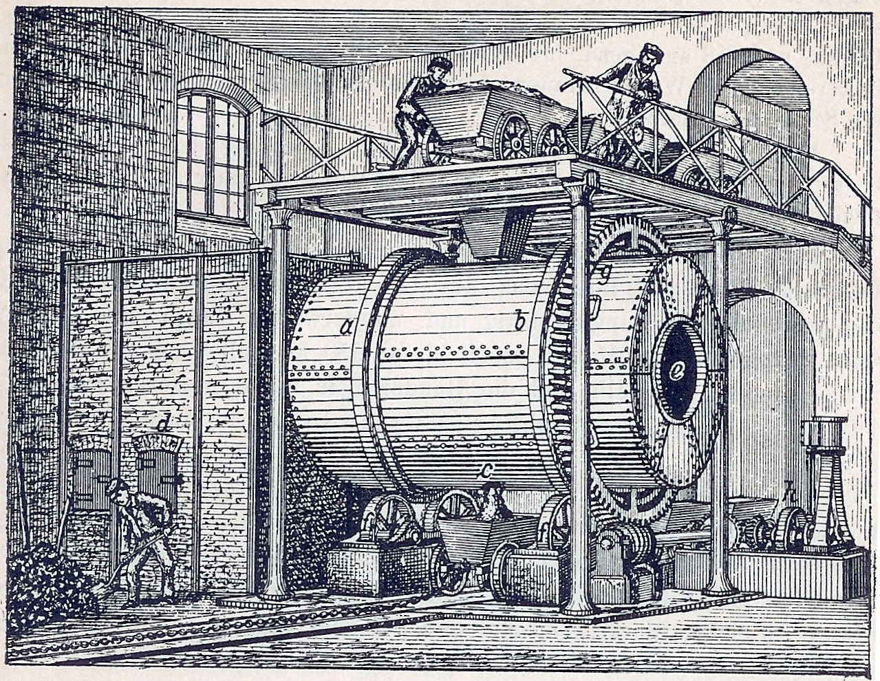 Zylinderofen für das Leblanc-Verfahren zur Herstellung von Soda